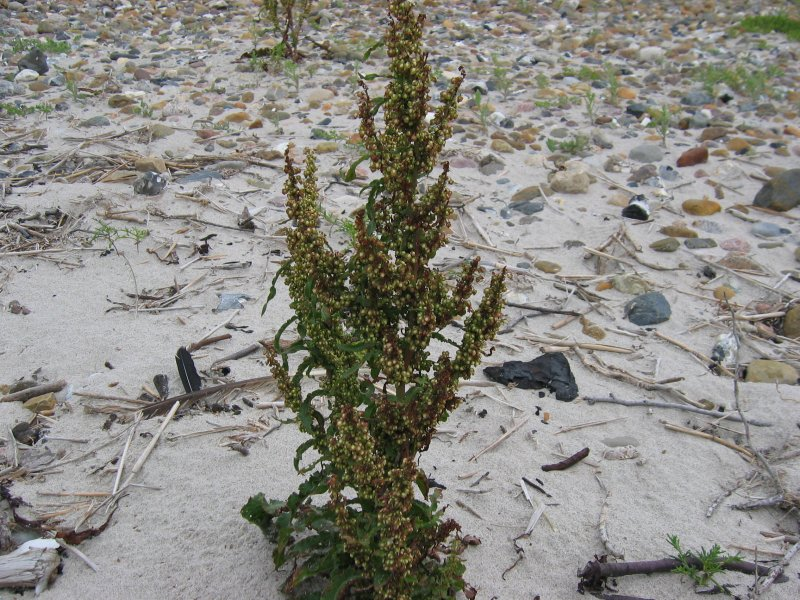 Krauser Ampfer Rumex crispus